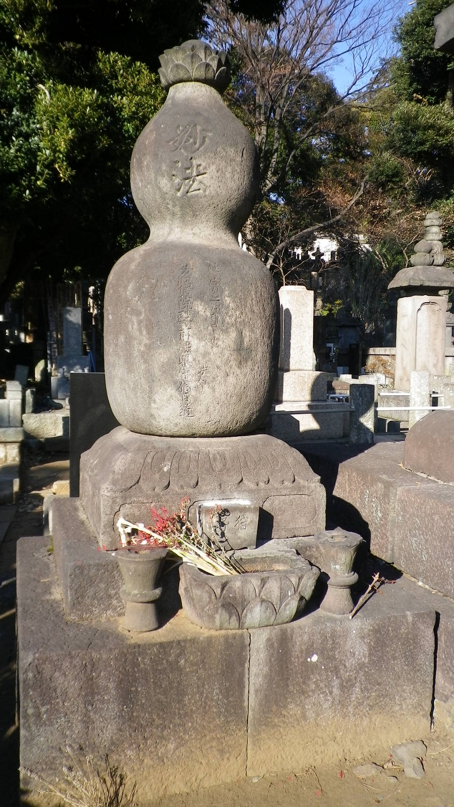 狩野探幽の墓